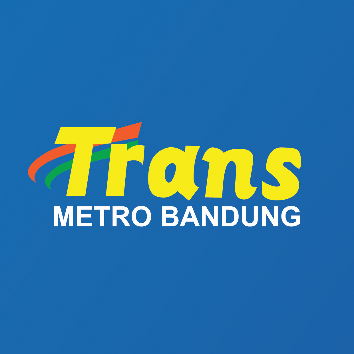 Logo resmi Trans Metro Bandung